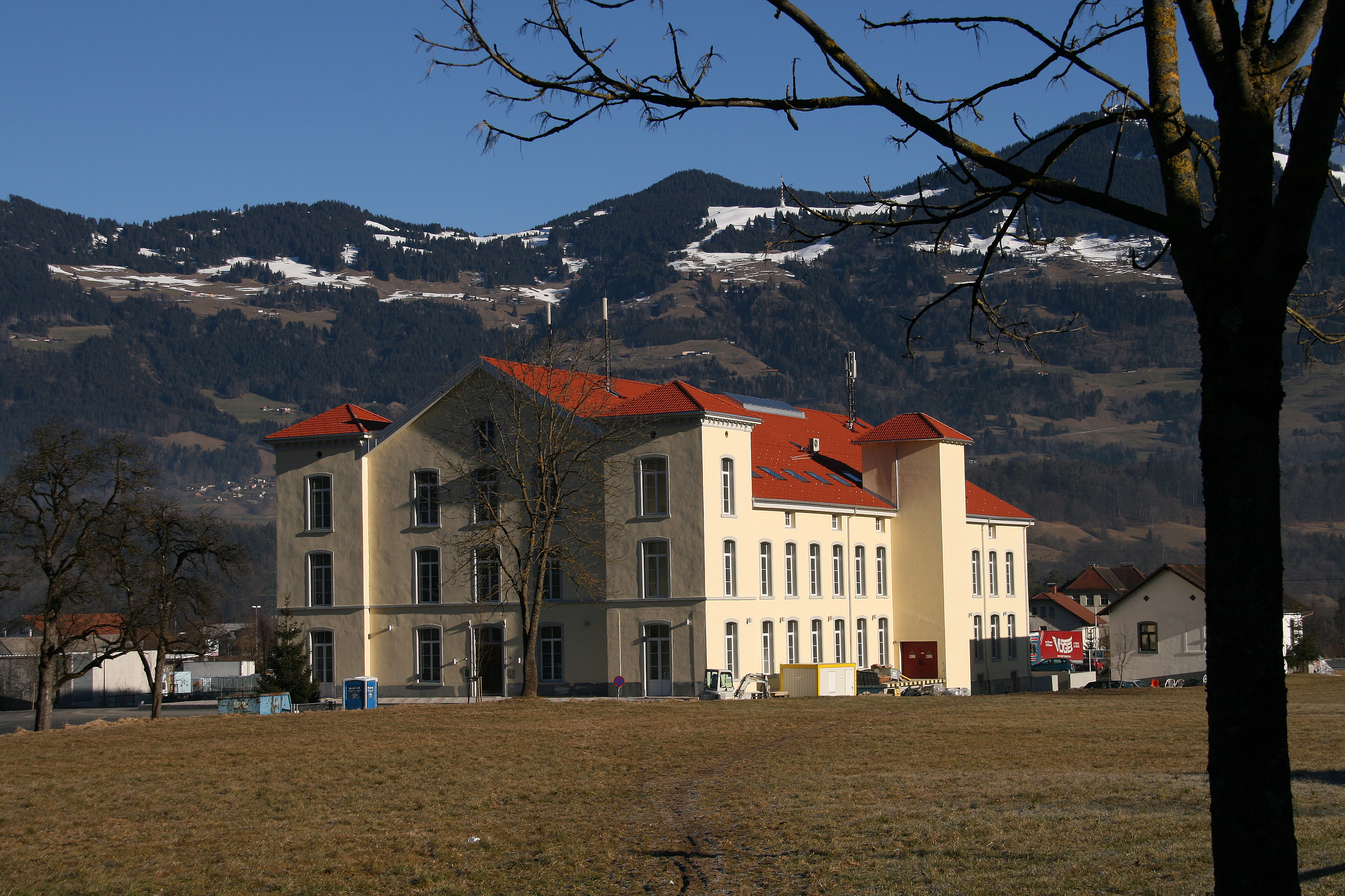 aus dem DEHIO Vorarlberg 1983: Eugen-Getzner-Strasse: Spinnereibetriebe, erbaut 1832 und 1882, mit Nebengebäuden, zugehöriges E-Werk 1897. *** in Nenzing; Vorarlberg.